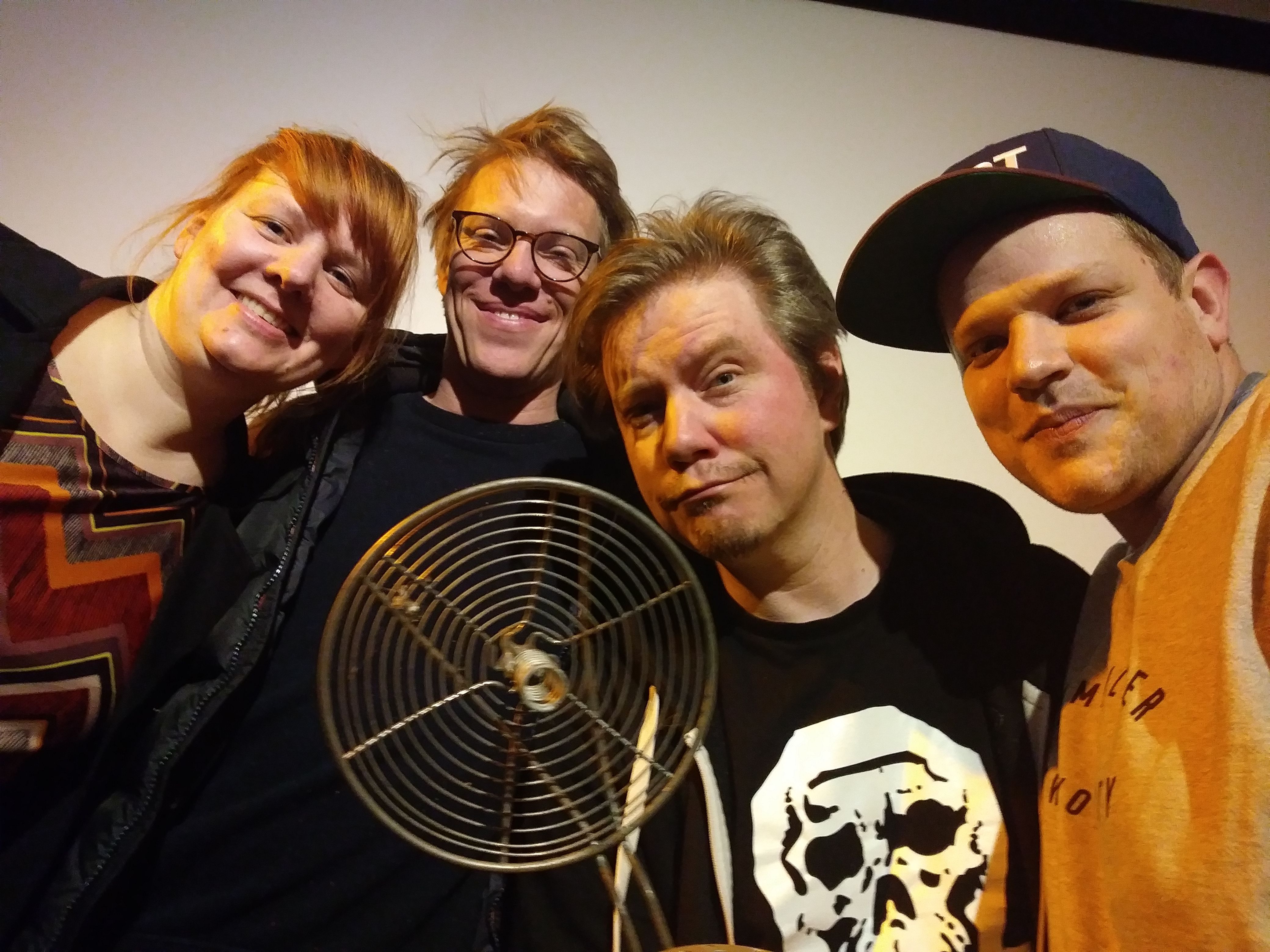 Lodderbast Kino Hannover Gäste